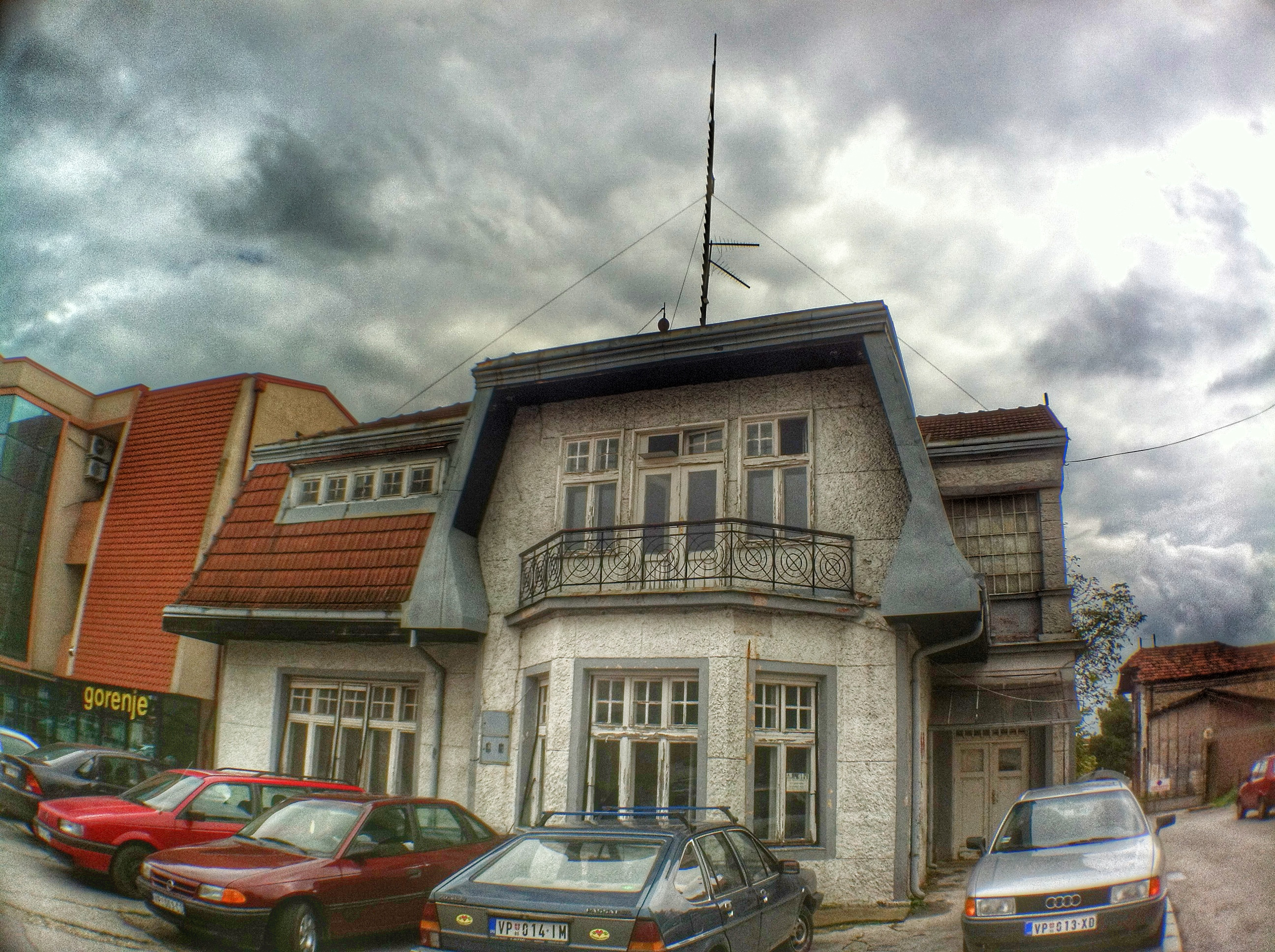 Српски (ћирилица): Подигнута 1922-е године од стране Тонија Клефиша немачког индустријалца и оснивача кланичне индустрије у Великој Плани.